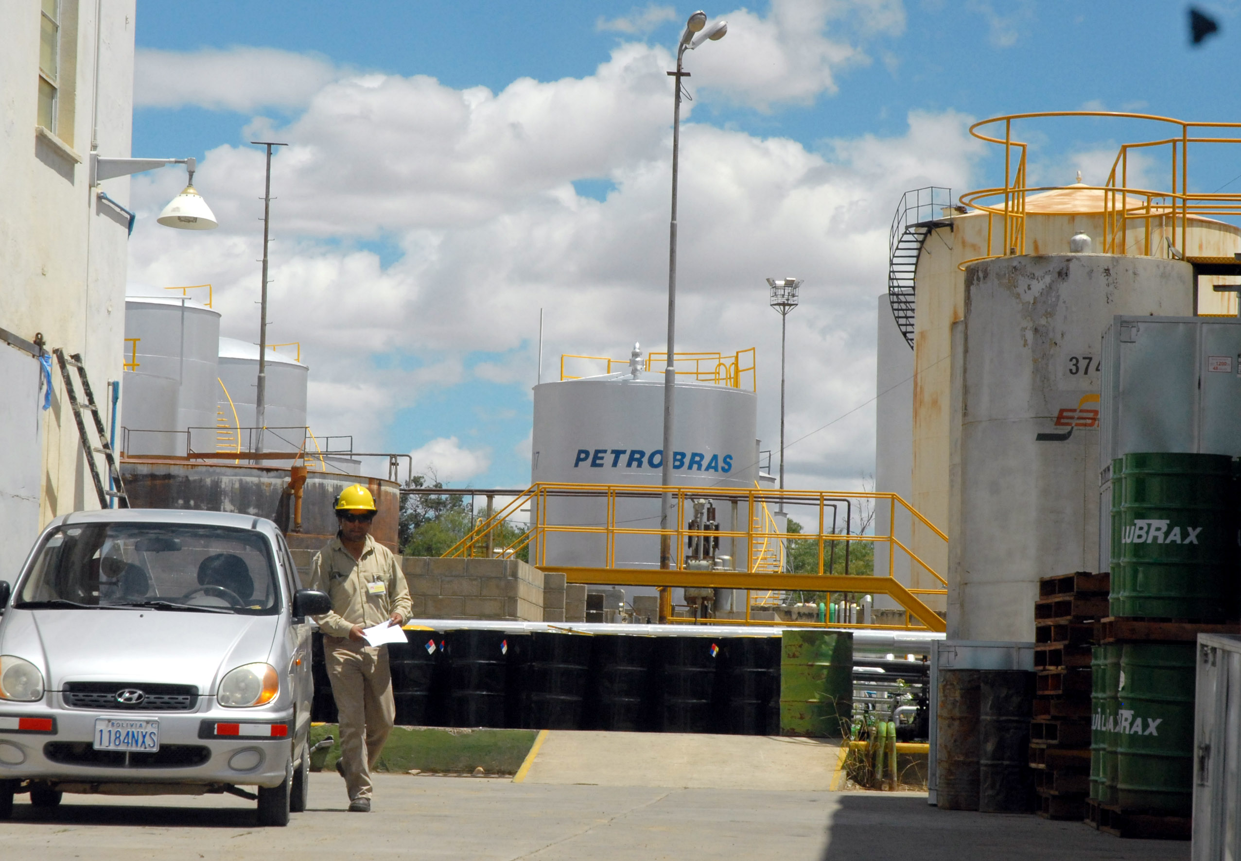 Refinaria da estatal brasileira Petrobrás em Cochabamba na região central da Bolívia.